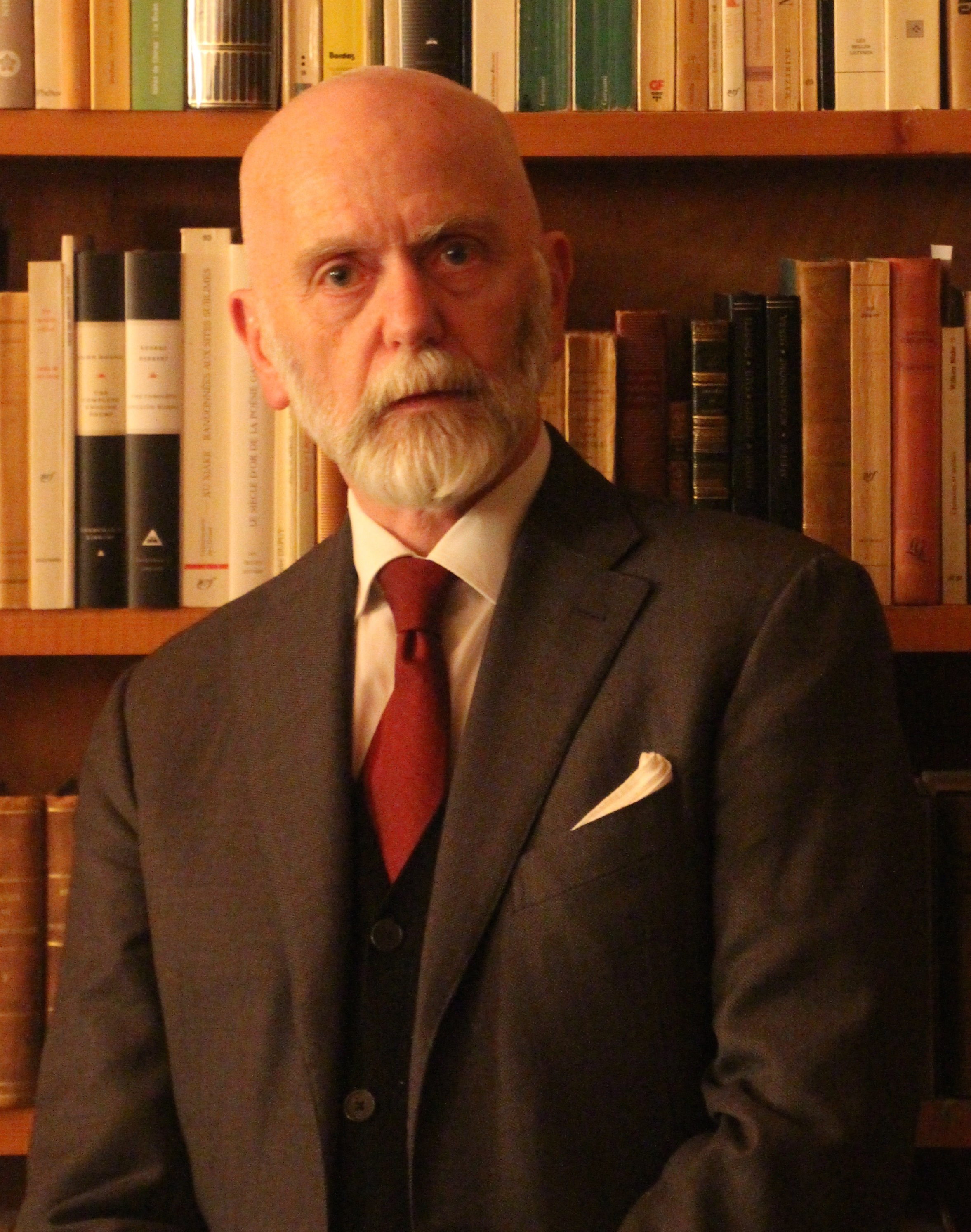 Autoportrait de Renaud Camus (mars 2019)